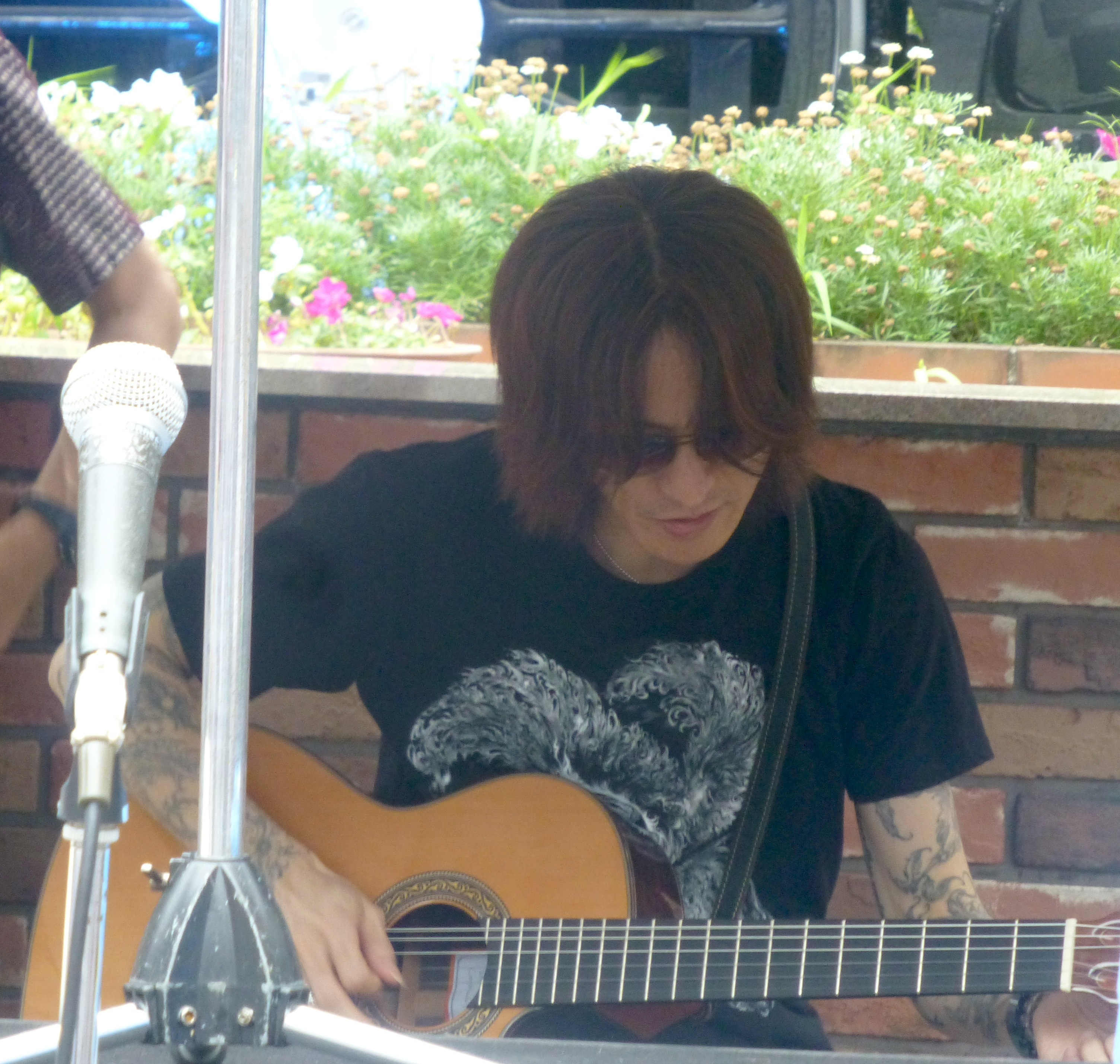 Sugizo